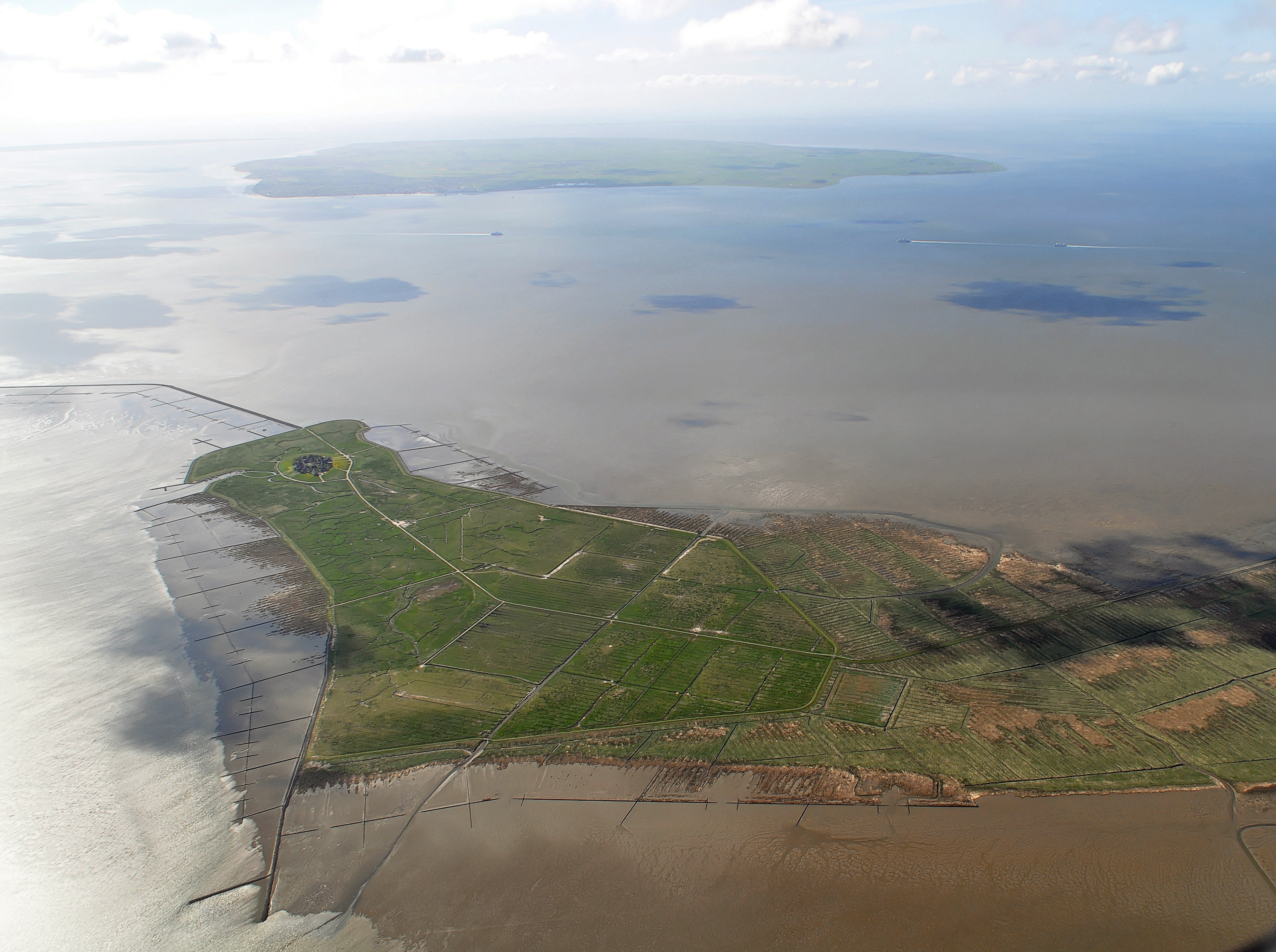 Luftbilder von der Nordseeküste 2012-05: Hallig Oland, im Hintergrund Föhr